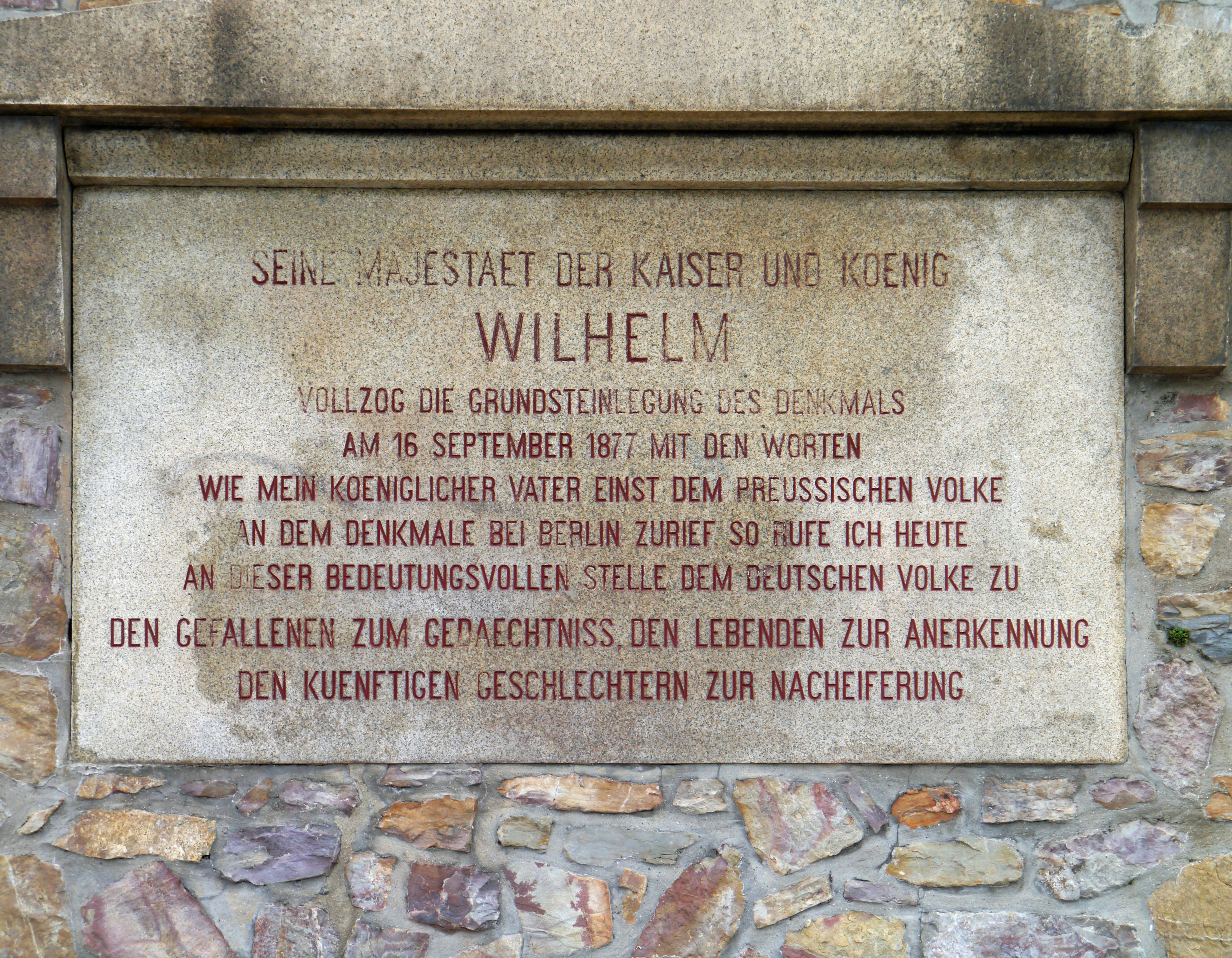 Niederwald-Denkmal (2012). Historische Worte des Deutschen Kaisers.